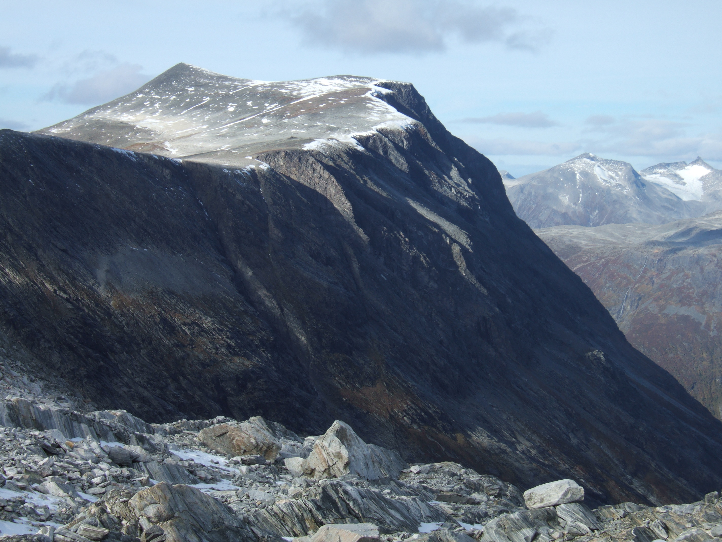 Storfjellet in Tafjordfjella i Norddal